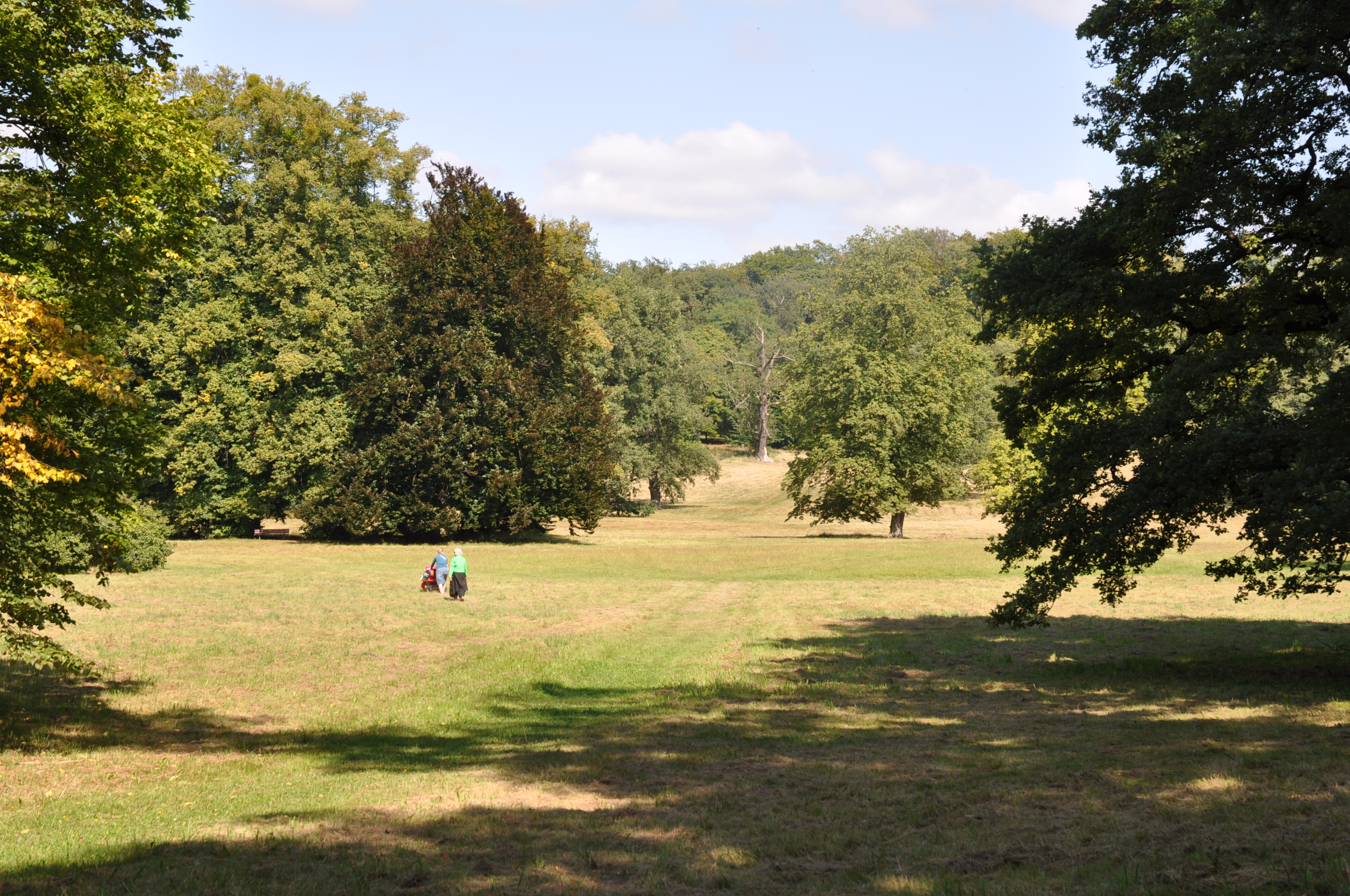 Klein Glienicke Großer Wiesengrund